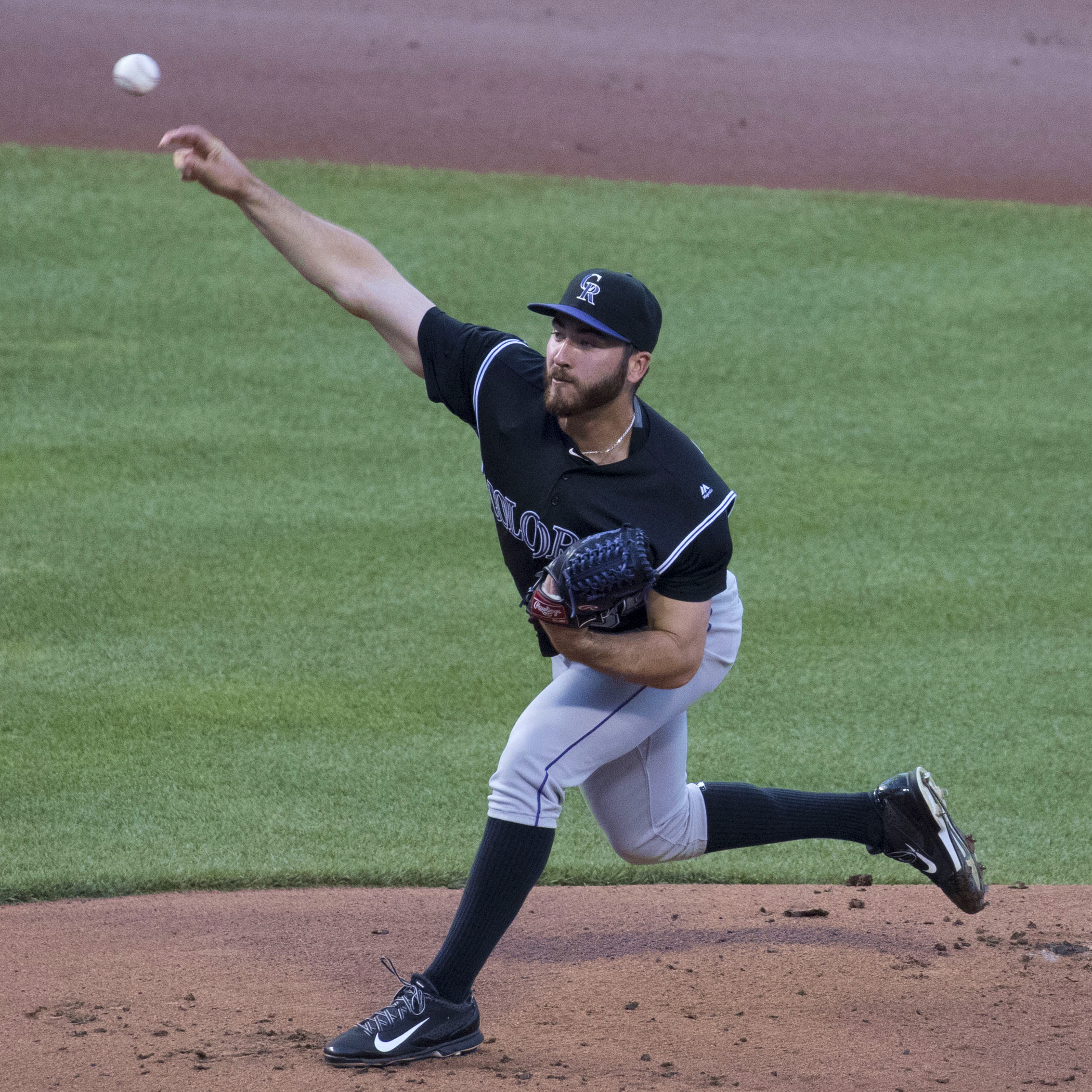 Chad Bettis